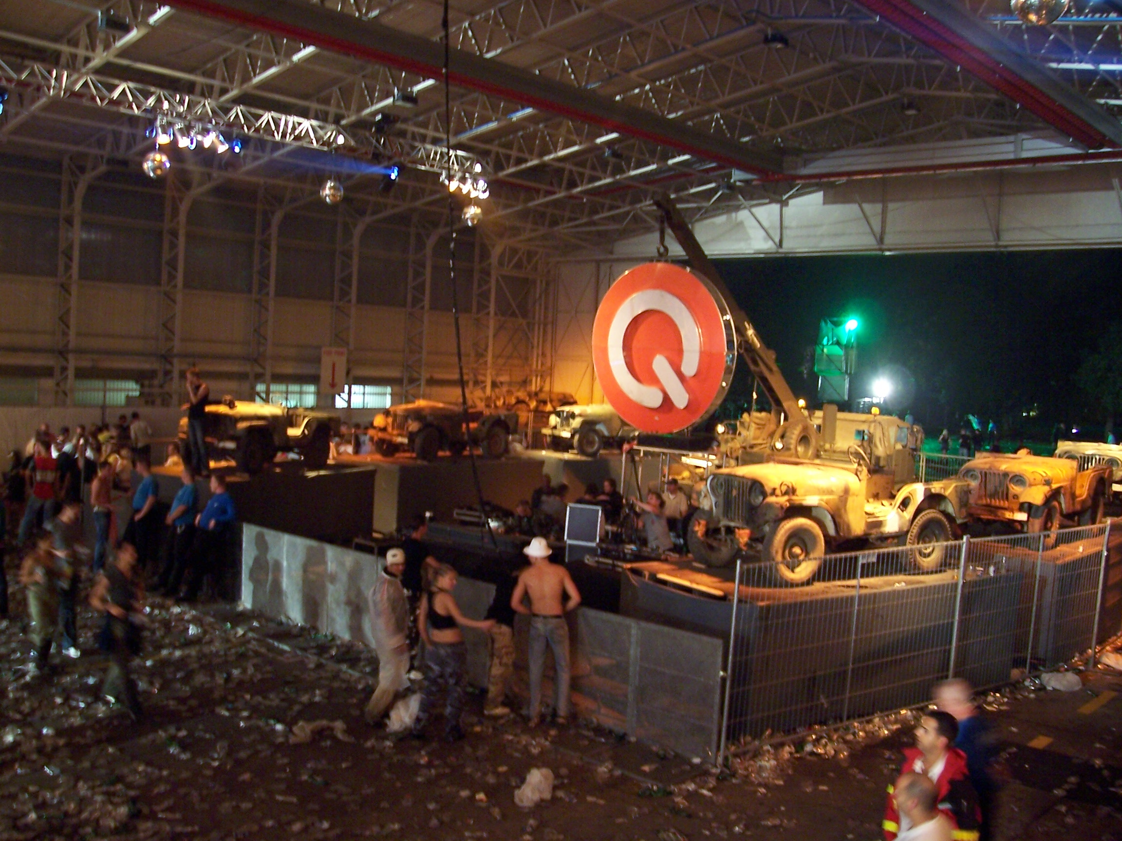 Q-Base, Bühne Nederlande, 10 Minuten nach dem Ende